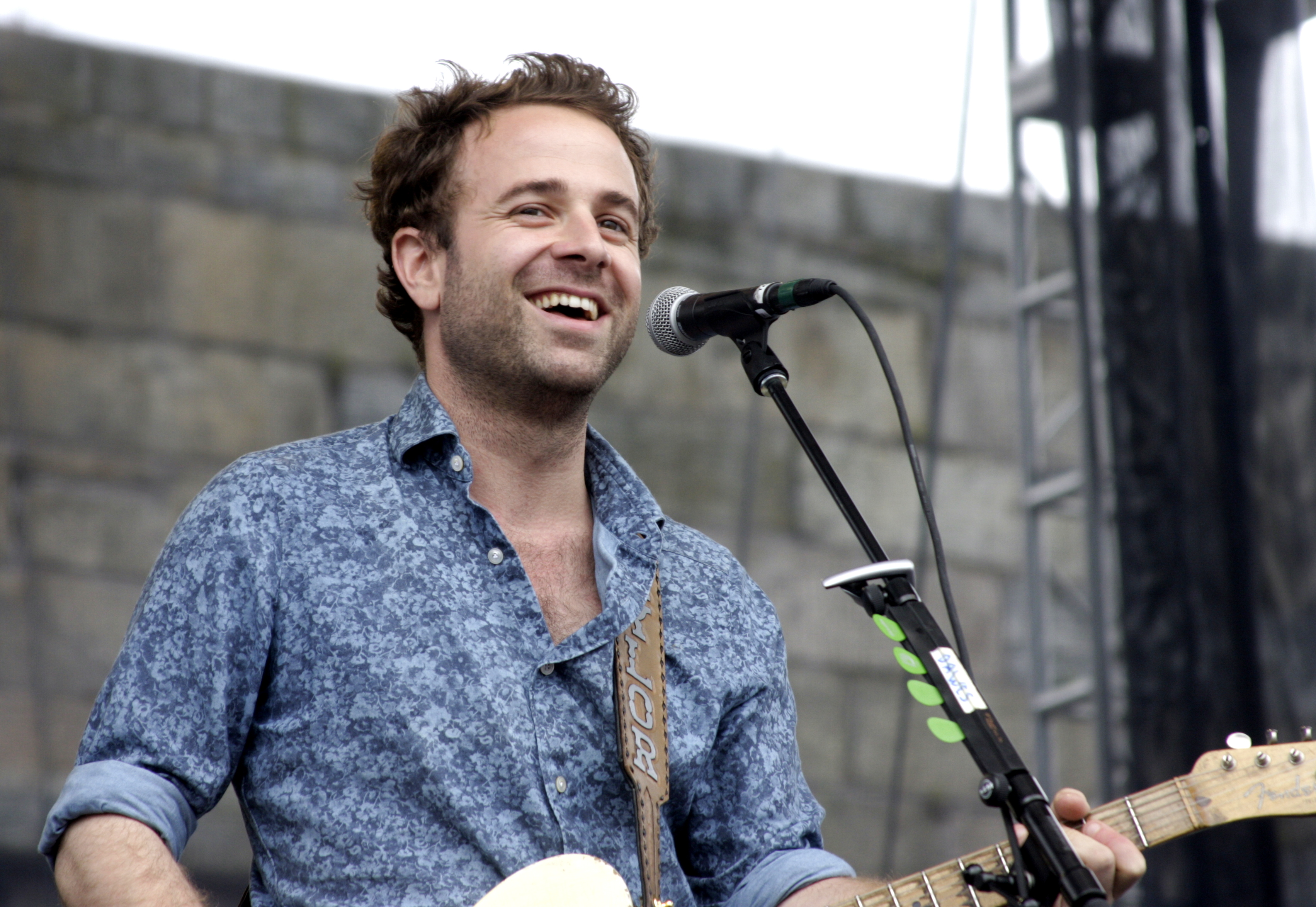 Dawes